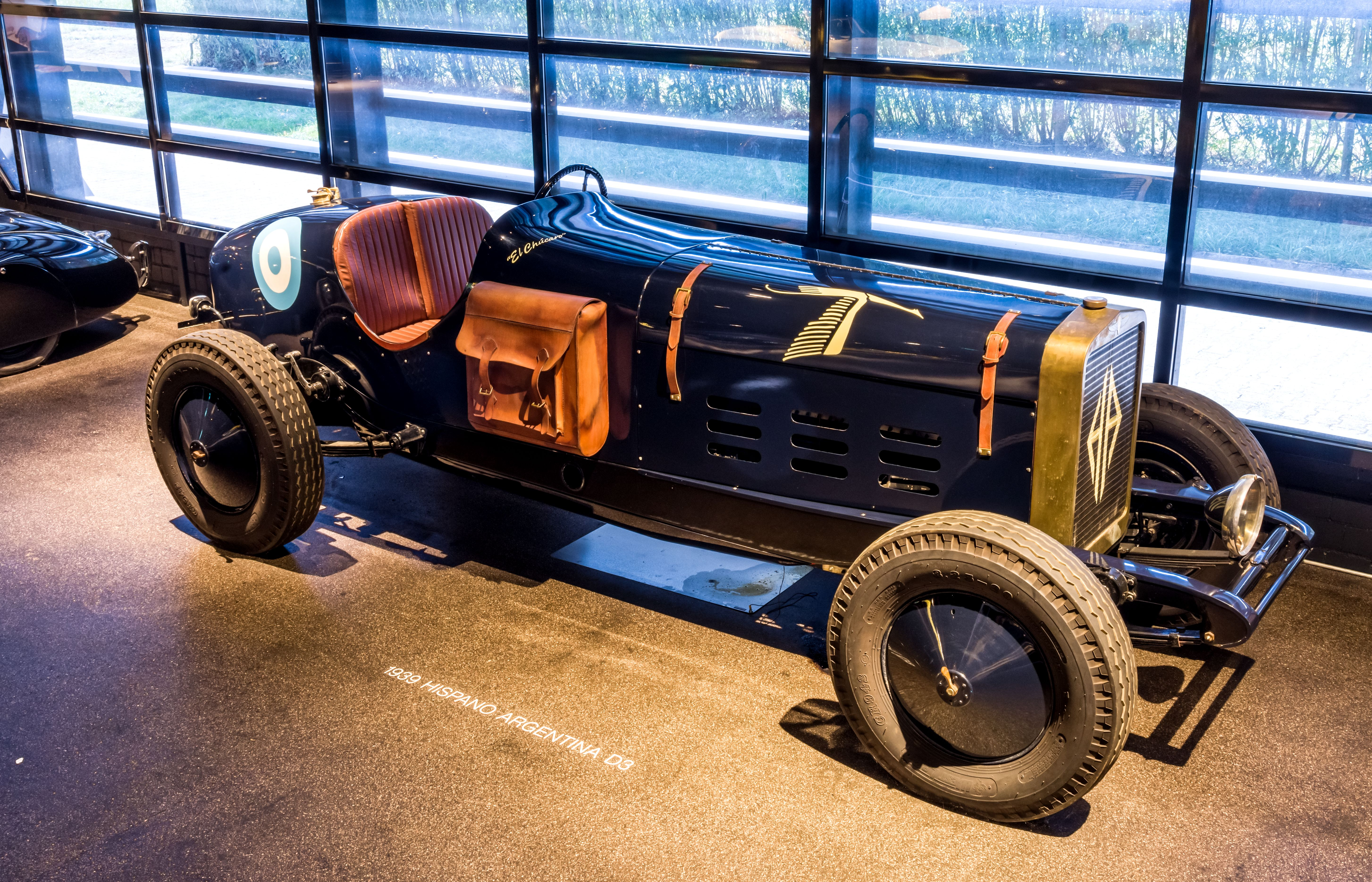 Das Volante Oldtimermuseum in Kirchzarten